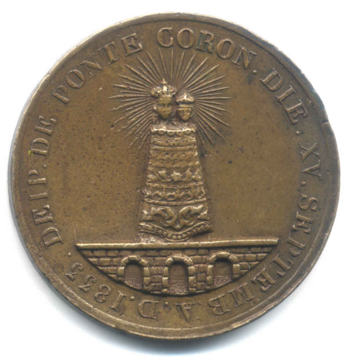 Medaglia Commemorativa della Madonna del Ponte venerata a Lanciano.